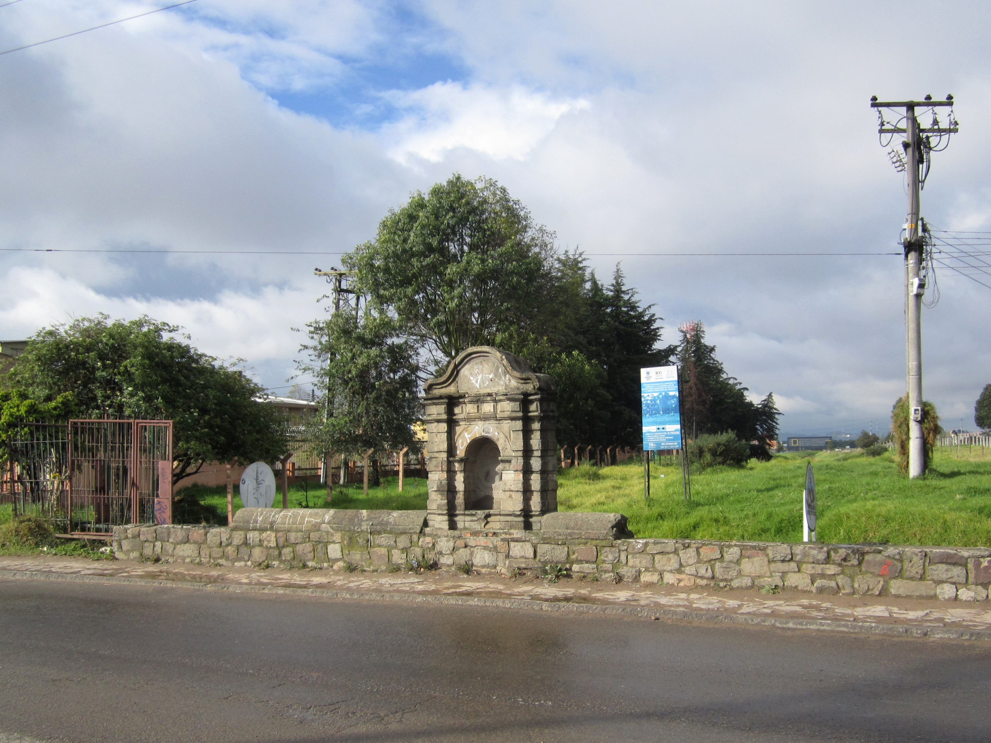 Bogotá